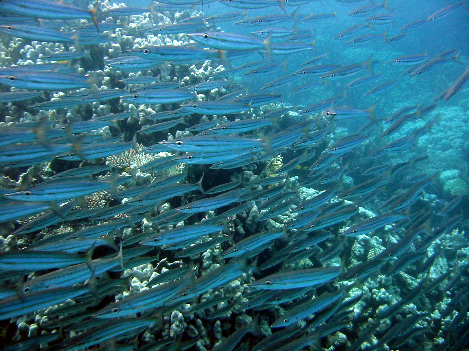 Sphyraena flavicauda Taba Egypt